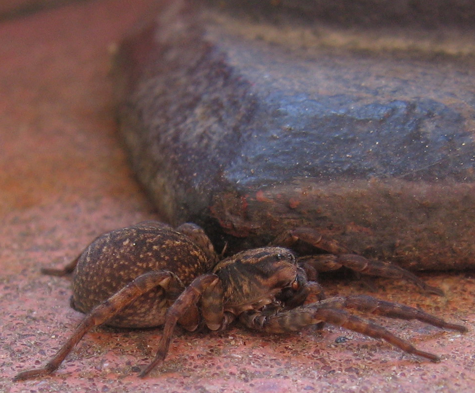 Trochosa terricola (Krzeczek naziemnik), fotografia wykonana w Małopolsce (Poland) w najbliższym otoczeniu domu. Wielkość (size): ok. 1.5—2.0 cm z nogami (with legs).